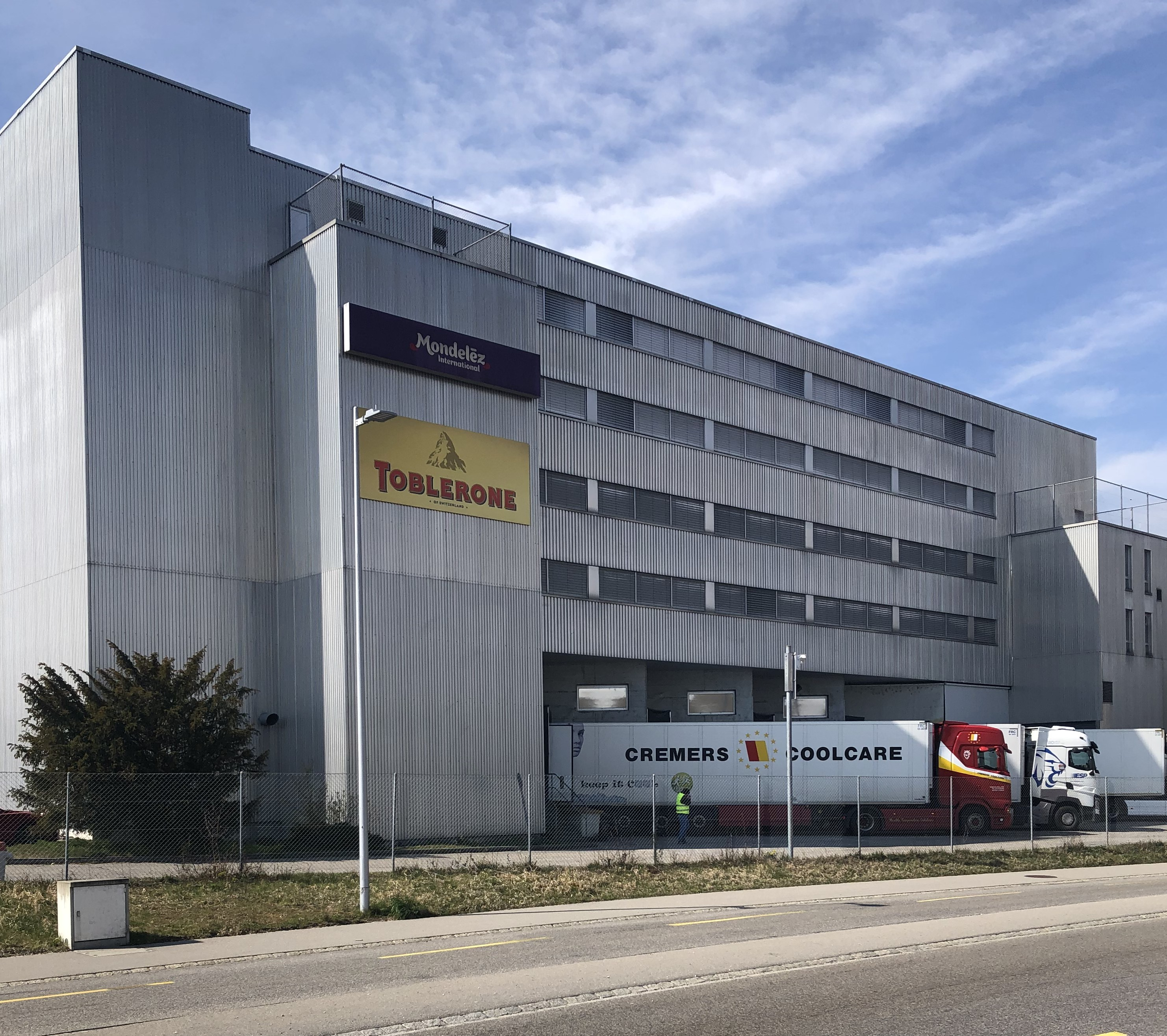 Toblerone-Fabrik Bern-Brünnen auf dem Gebiet des Gebräuchlichen Quartiers Niederbottigen